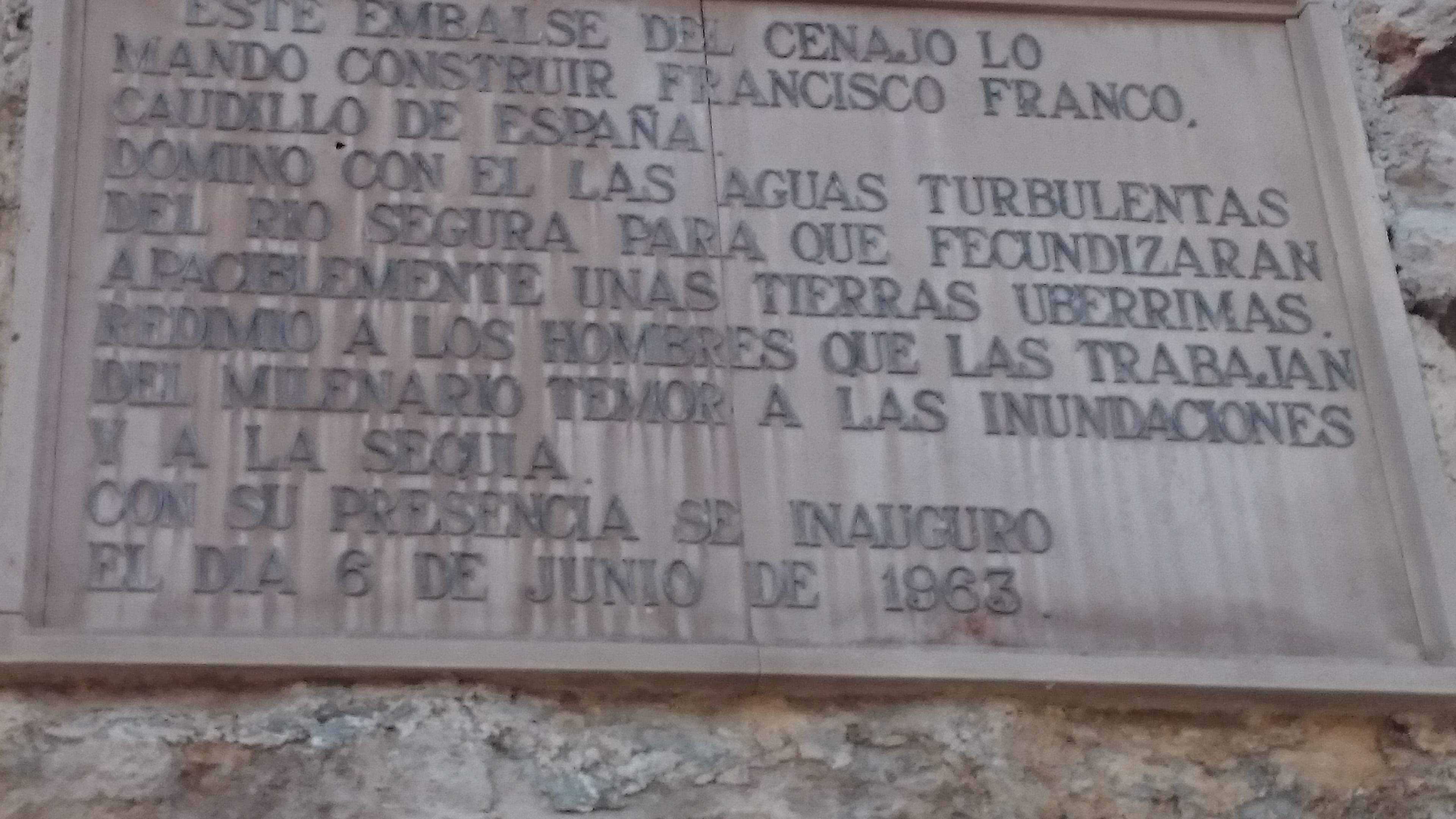 La placa agradece a Francisco Franco y a sus políticas por la construcción de este embalse. Estuvo instalada desde 1963 hasta 2016, cuando fue retirada por la CHS en cumplimiento de la Ley de Memoria Histórica.